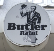 Außenwerbung "Butler Reini" (Balingen, 1950er Jahre)